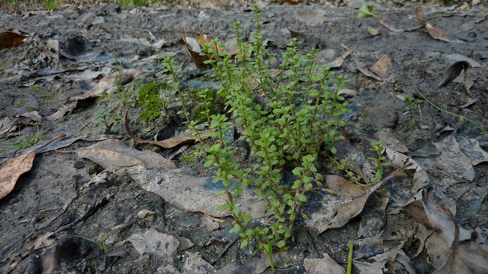 Anagallis minima (L.) Krause